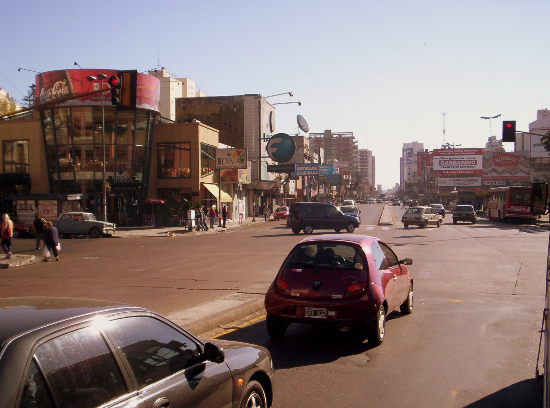 Avenida Hipólito Yrigoyen en la Intersección con la Avenida 25 de Mayo, frente a la Estación Lanús